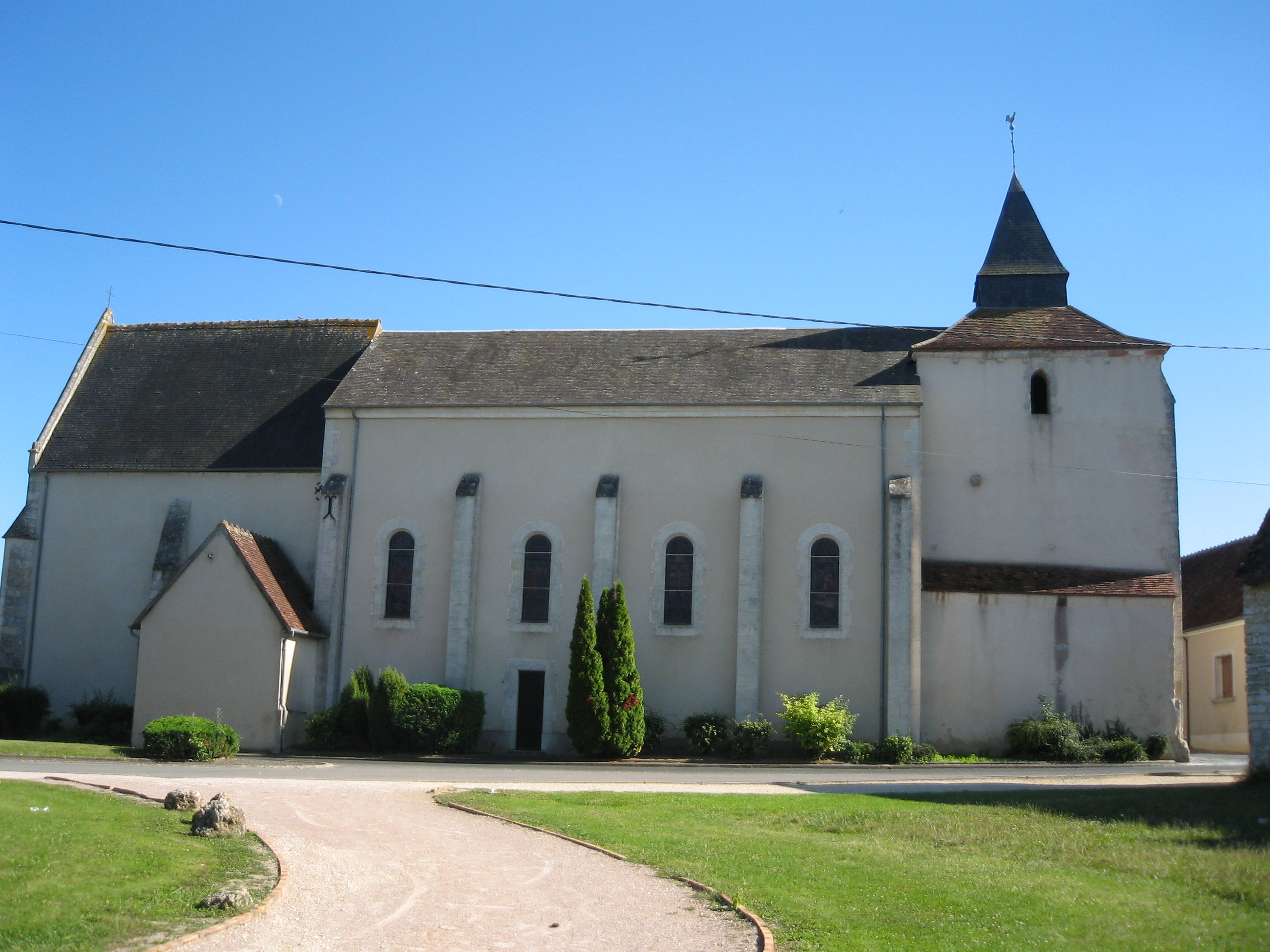 Eglise Saint Pierre, XII°, XVII° et XIX°, Civray.